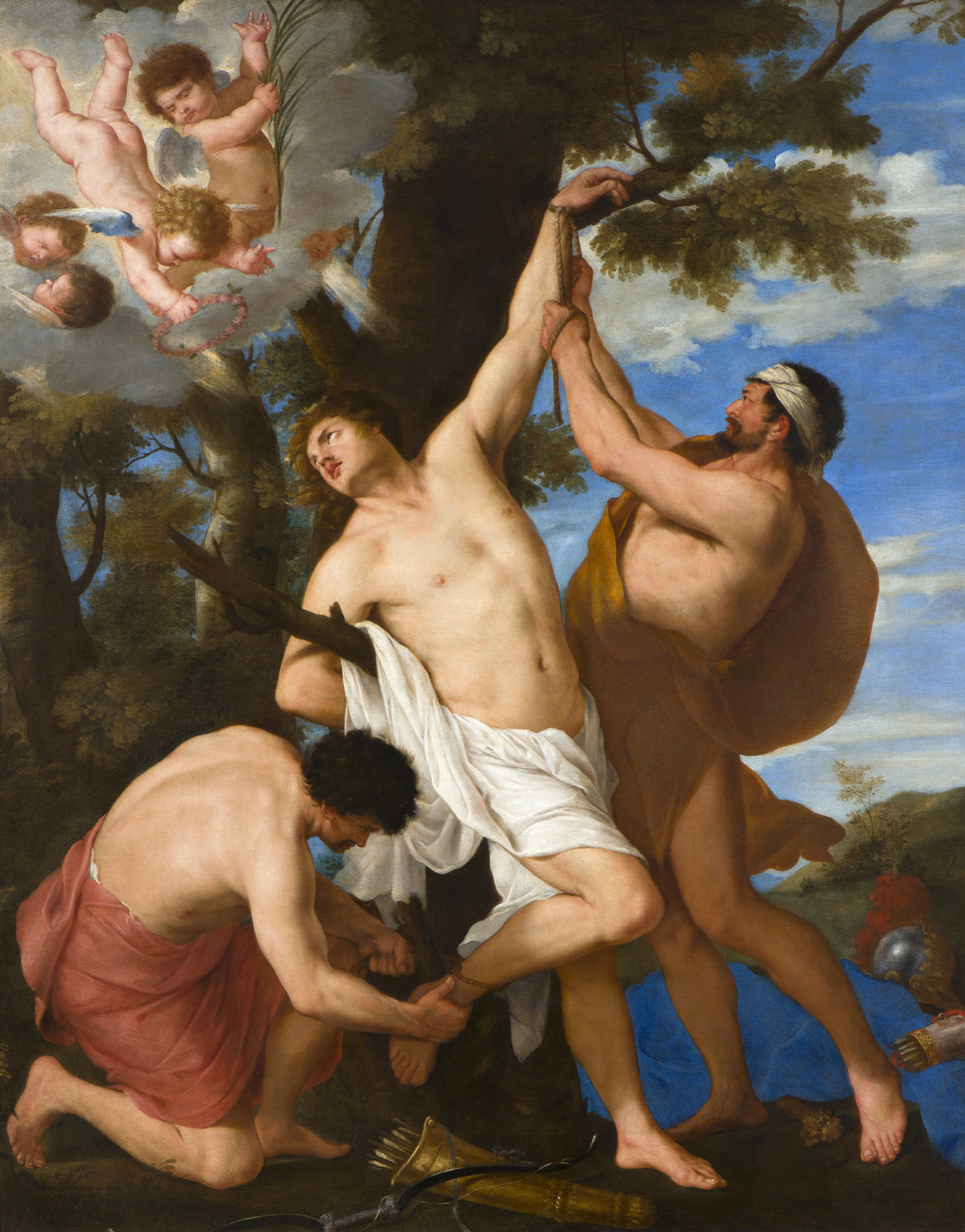 Martirio di San Sebastiano, Karel Philips Spierinck. Olio su tela, 157.4 x 121.8 cm.